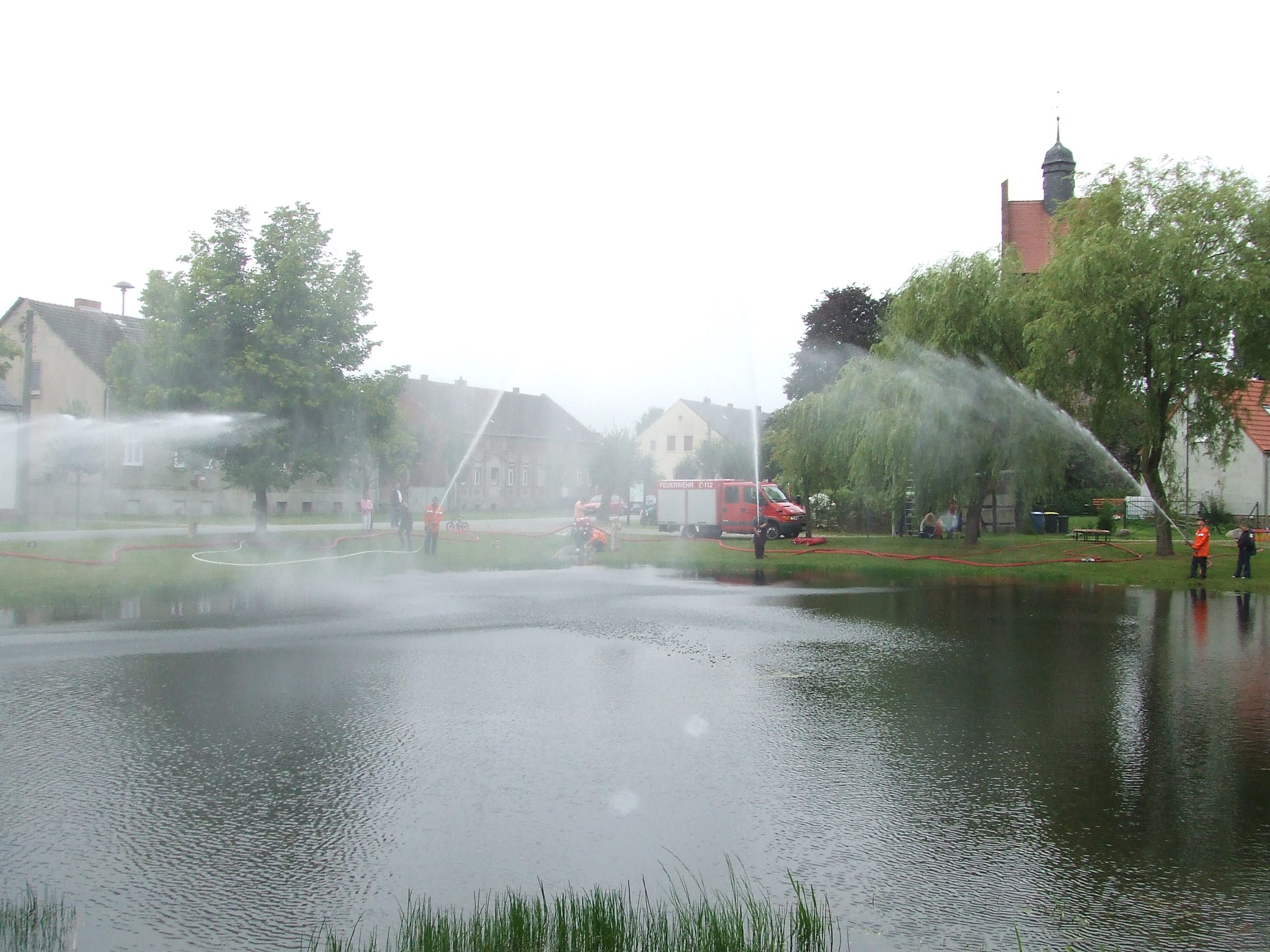 Teich und Kirche in Schönermark